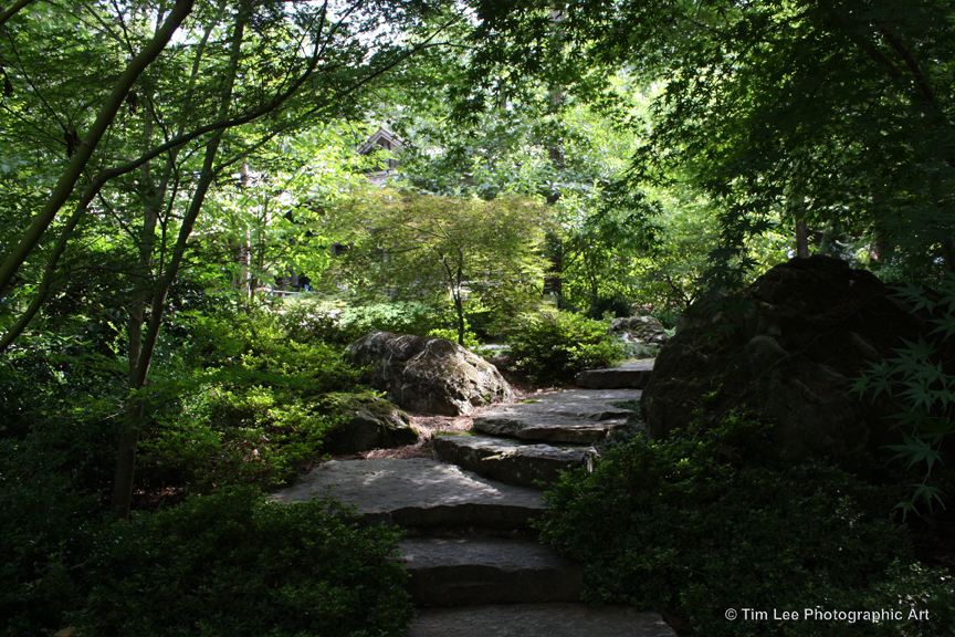 Japanese Garden in Garvan Woodland Gardens, Hot Springs, Arkansas, United States.